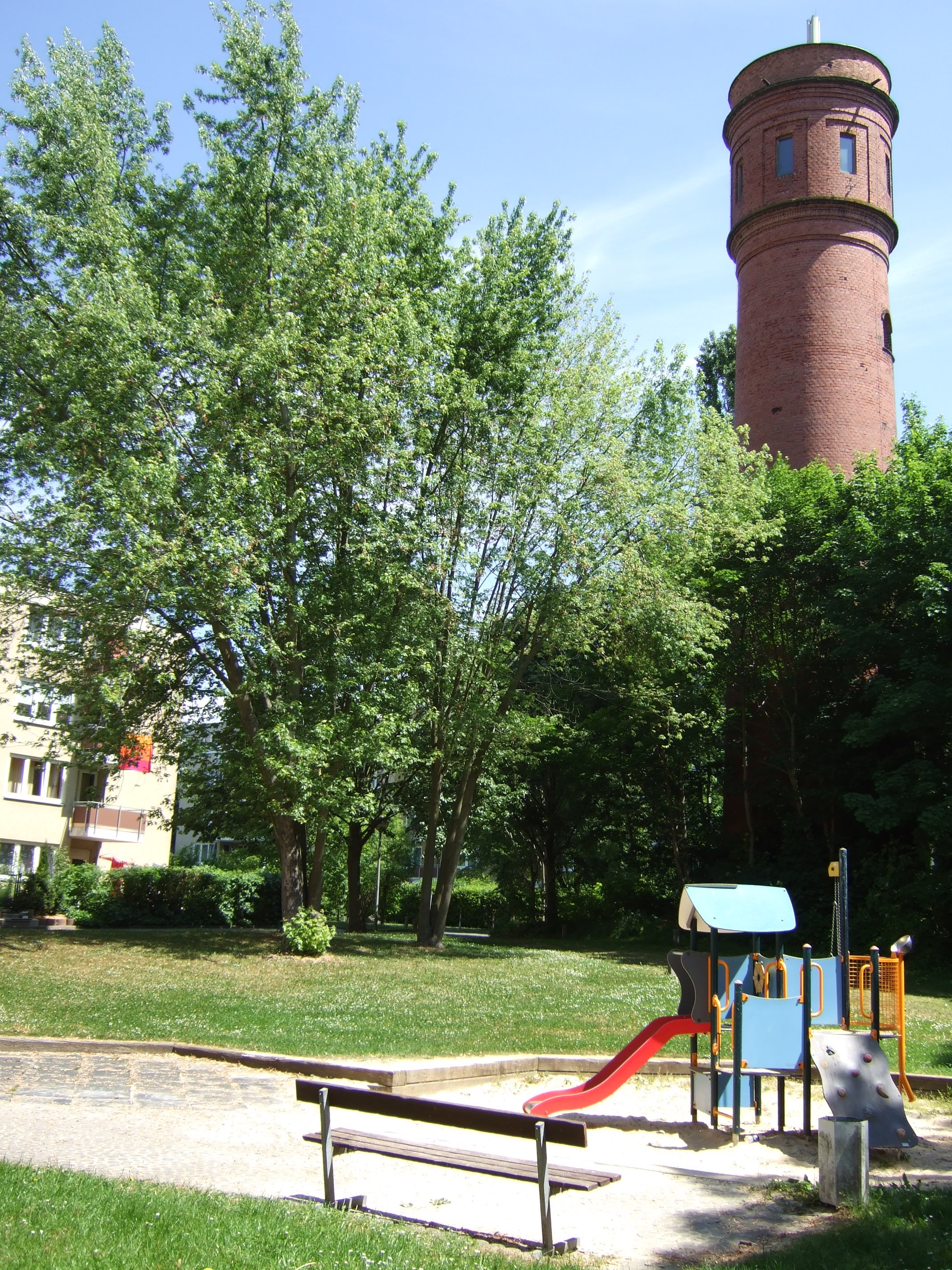 Wasserturm der ehemaligen Mechanischen Baumwoll-Spinnerei in Bayreuth, Denkmal Nr. D-4-62-000-419